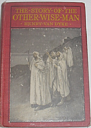 Εξώφυλλο ξενόγλωσσου βιβλίου που δημοσιεύτηκε για πρώτη φορά το 1895.